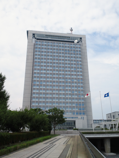 茨城県庁舎(2010年7月26日撮影)